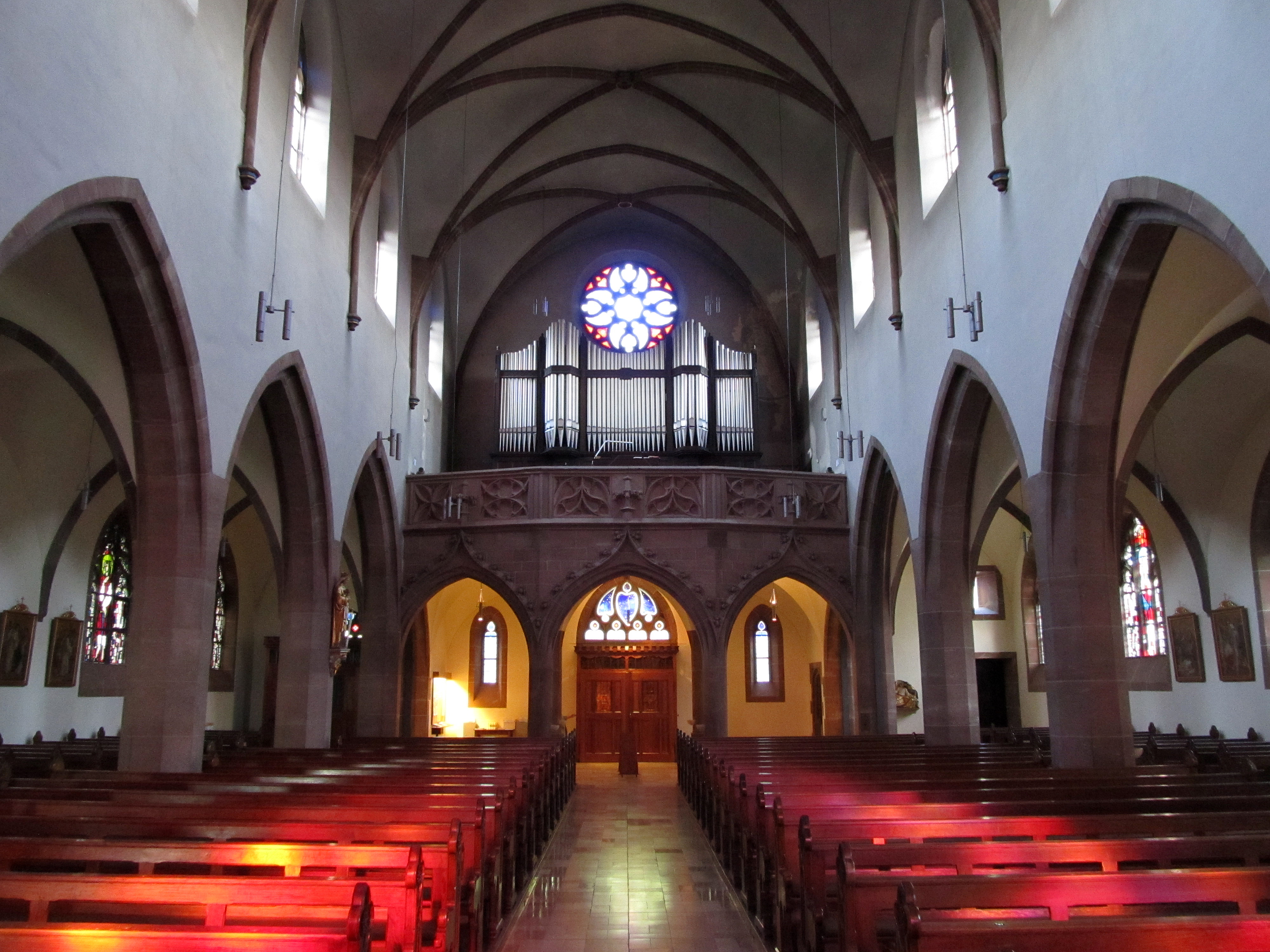 Blick ins Innere der katholischen Pfarrkirche Herz Jesu in Altenwald, einem Stadtteil von Sulzbach, Saarland